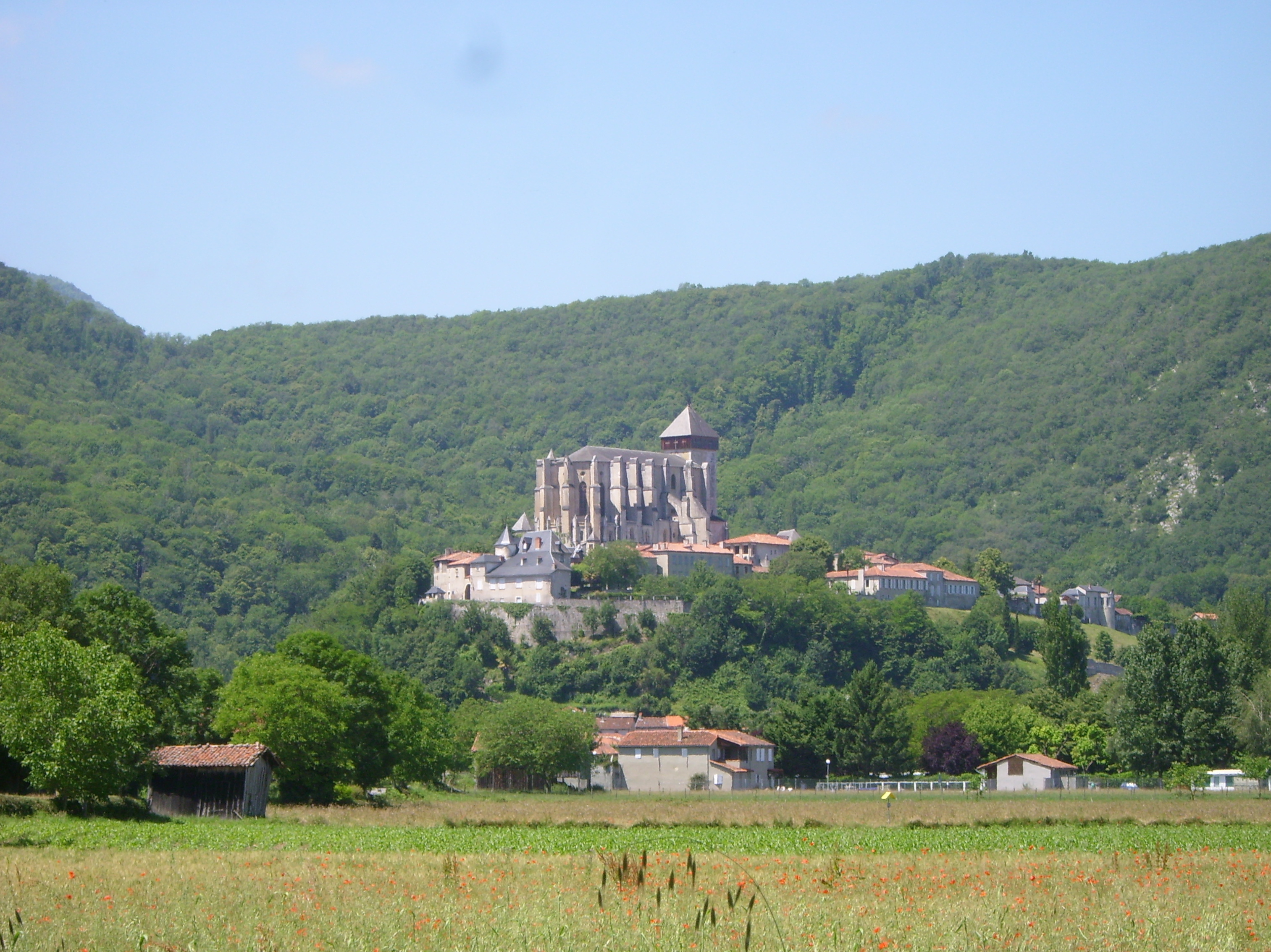 La cathédrale de Saint-Bertrand-de-Comminges : vue générale